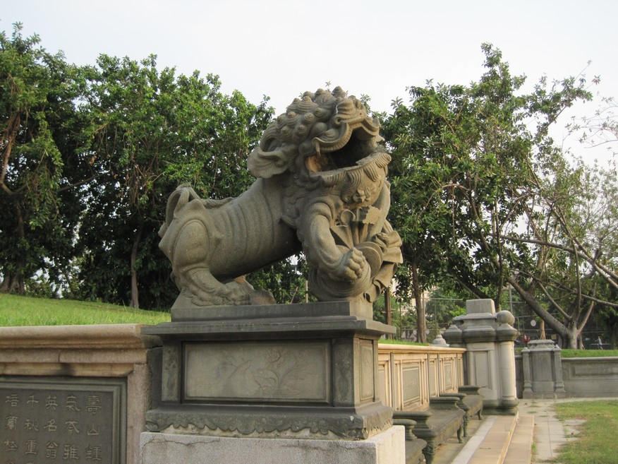 高雄陳中和墓石獅。